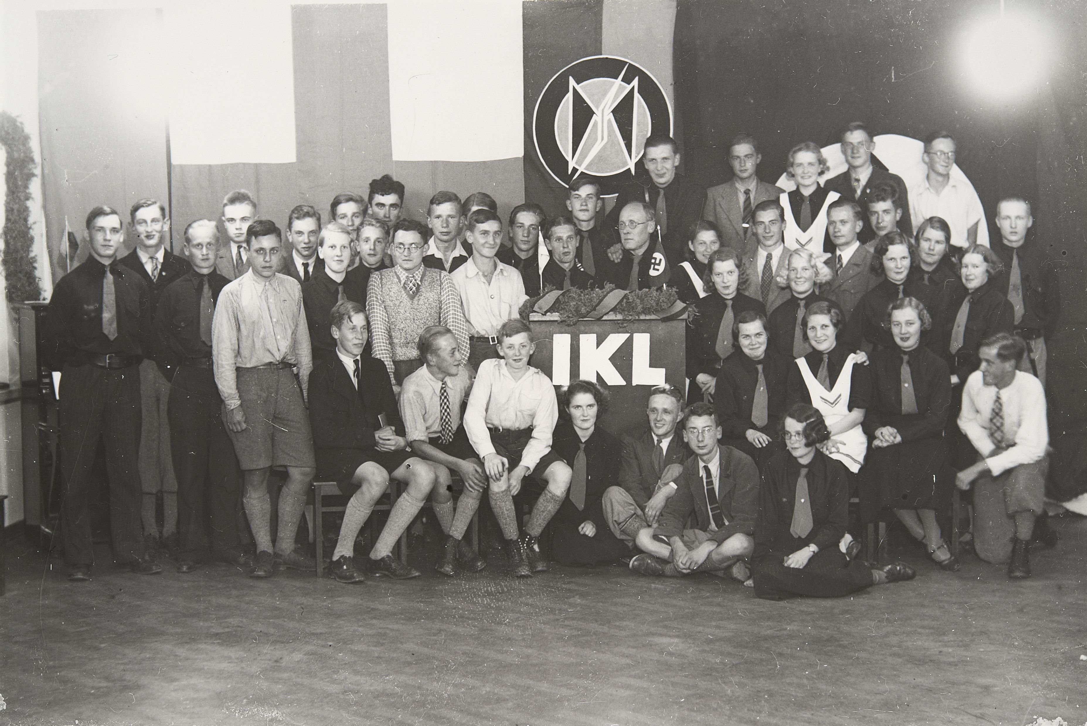 Hitler-jugend vierailulla Suomessa Sinimustien vieraana 7.8.1934